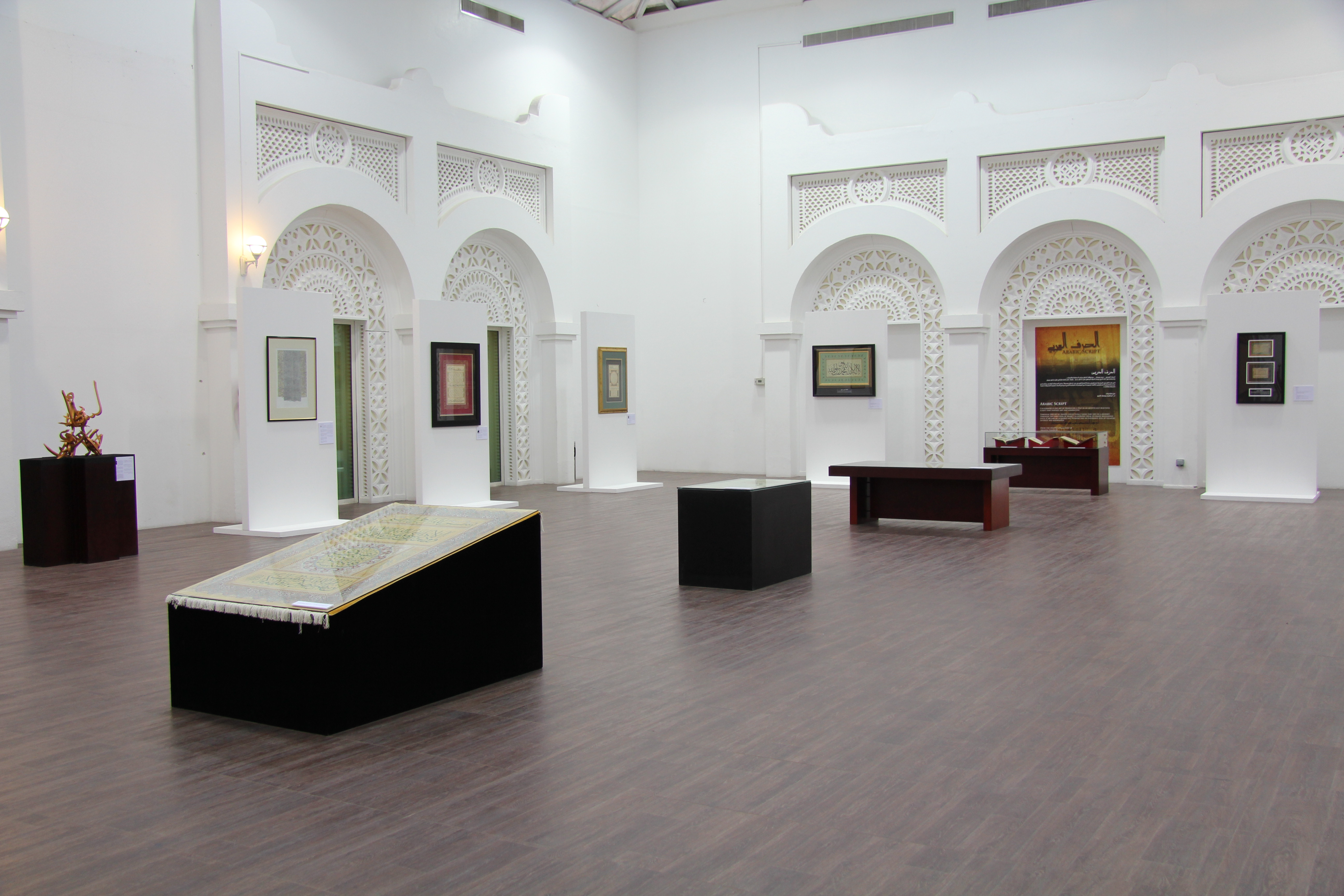 ضم معرض الحرف العربي والذي انطلق في مؤسسة قطر شهر سبتمبر عام 2014 مجموعة نادرة من الأعمال الفنيّة التي توضح جماليات الحرف العربي من مجموعة المقتني المهندس إبراهيم فخرو. ويسلّط المعرض الضوء على ثلاثة محاور رئيسية هي بدايات ظهور الخط العربي، وملامح تطور الخط العربي، والخط العربي في العصر الحديث، ابرز ذلك من خلال إظهار الاستخدامات المختلفة للحرف العربي, بدءاً من المخطوطات وحتى الأقمشة والسيراميك مروراً بالنقود. فقد ضم المعرض قطعاً فنيّة تعود إلى القرنين التاسع والعاشر، ومن بينها قطع تعود للخطاطين الشهيرين حمد الله الأماسي والحافظ عثمان.